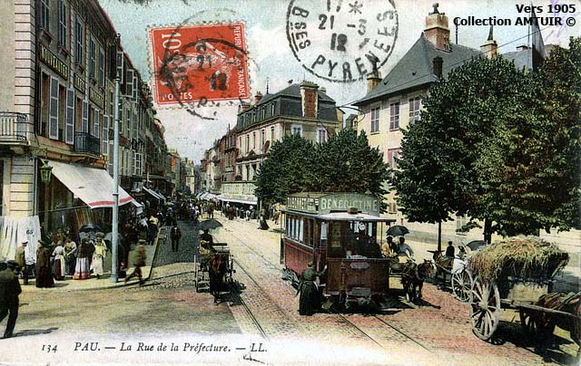 Carte postale oblitérée le 21 mars 1912. Cette carte représente l'ancien tramway de Pau